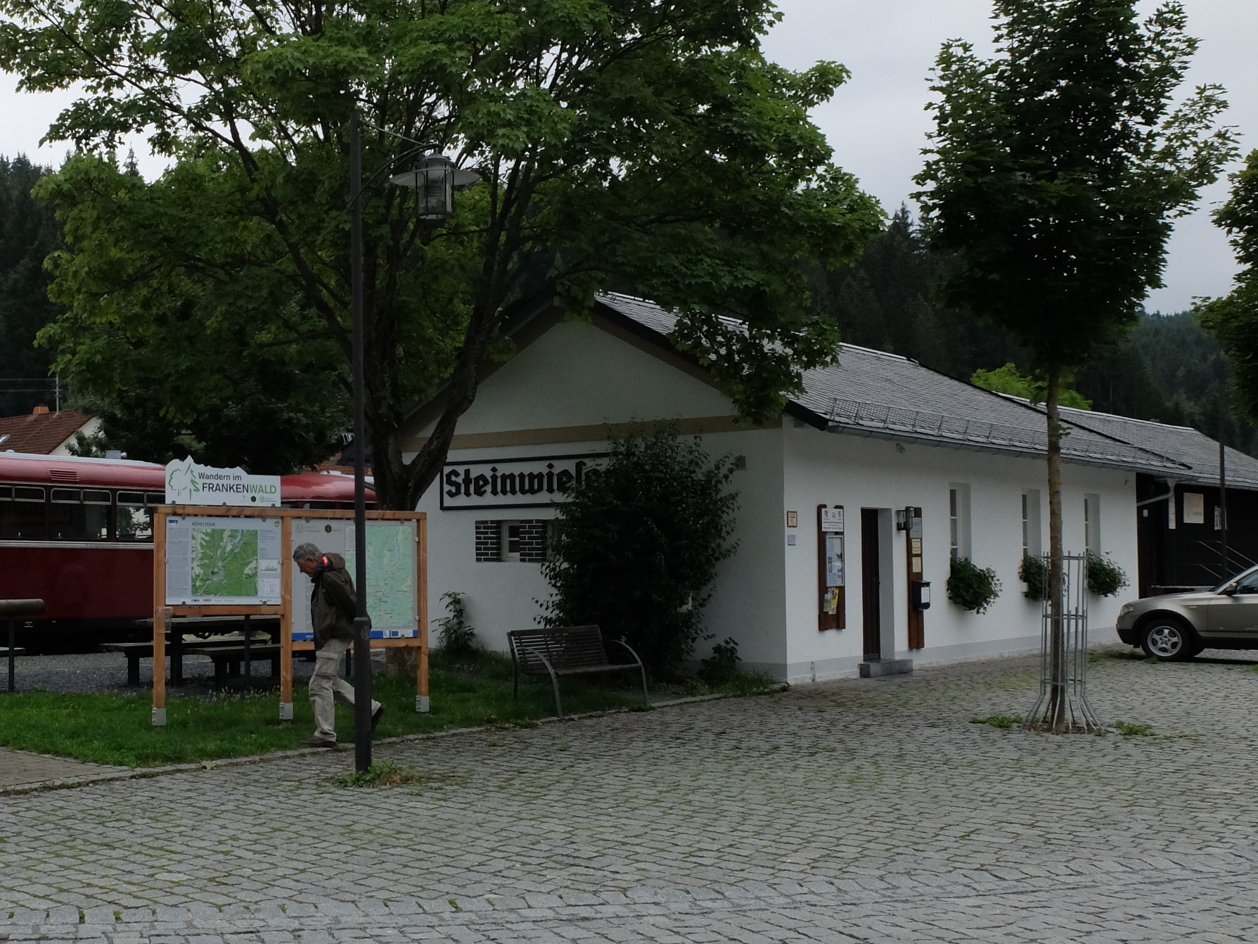 Bahnhof Steinwiesen an der RodachtalbahnThis is a photograph of an architectural monument.